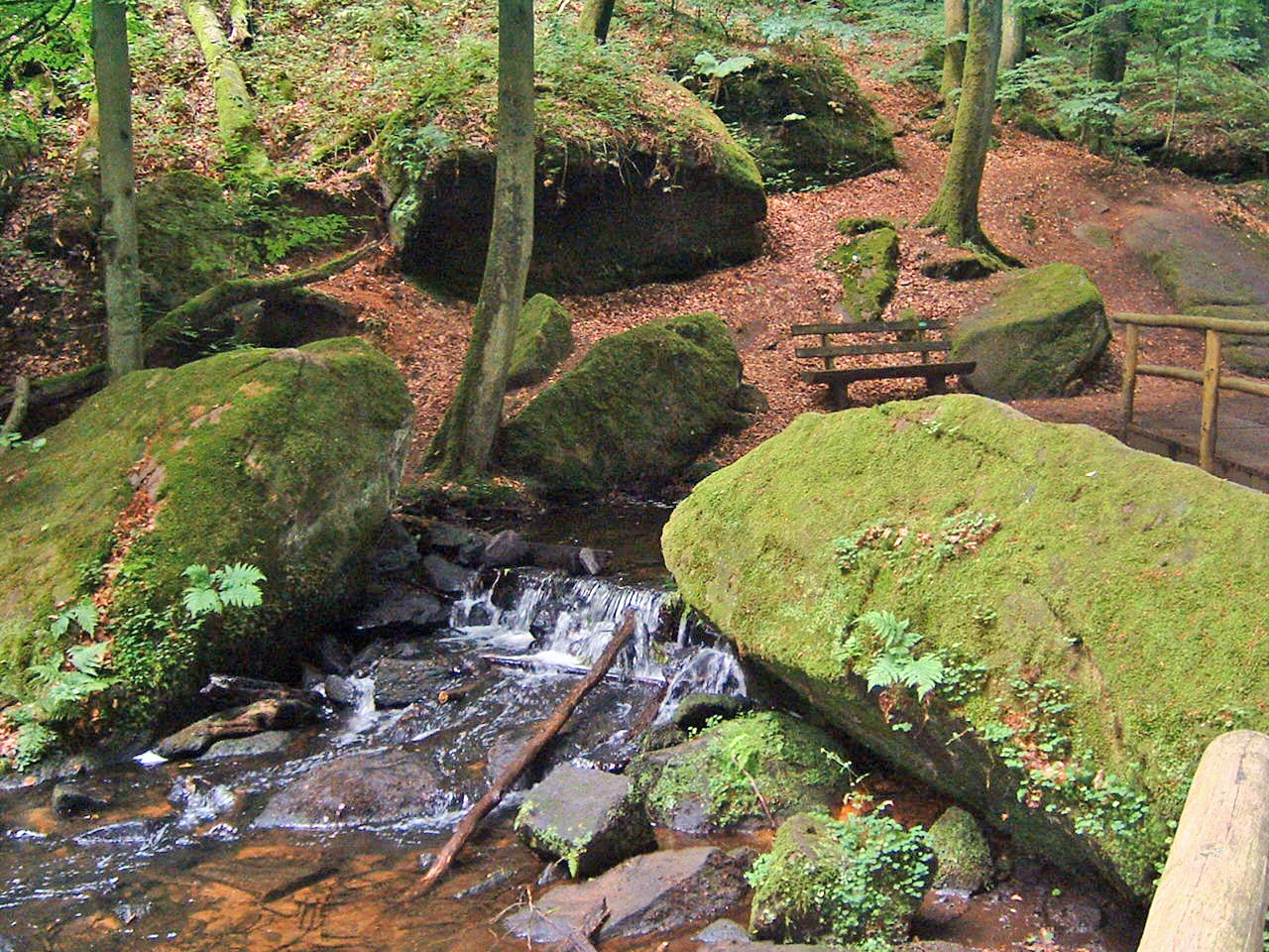 Moosalbe im Naturschutzgebiet „Karlstalschlucht“